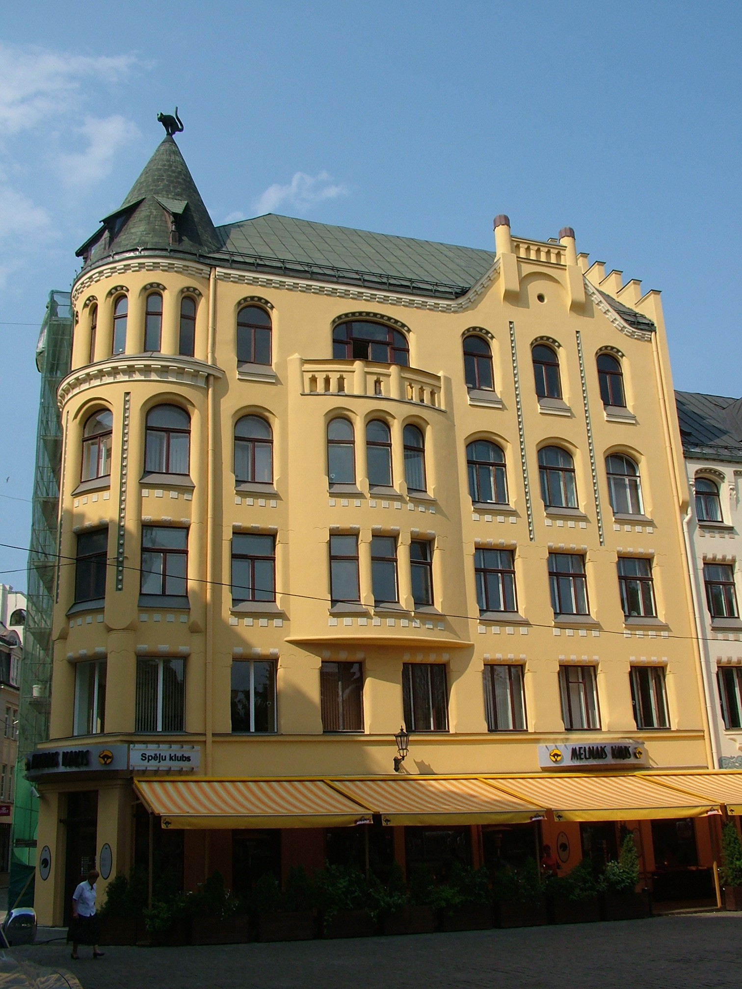 Building in Riga, Latvia.Dom pom kotami